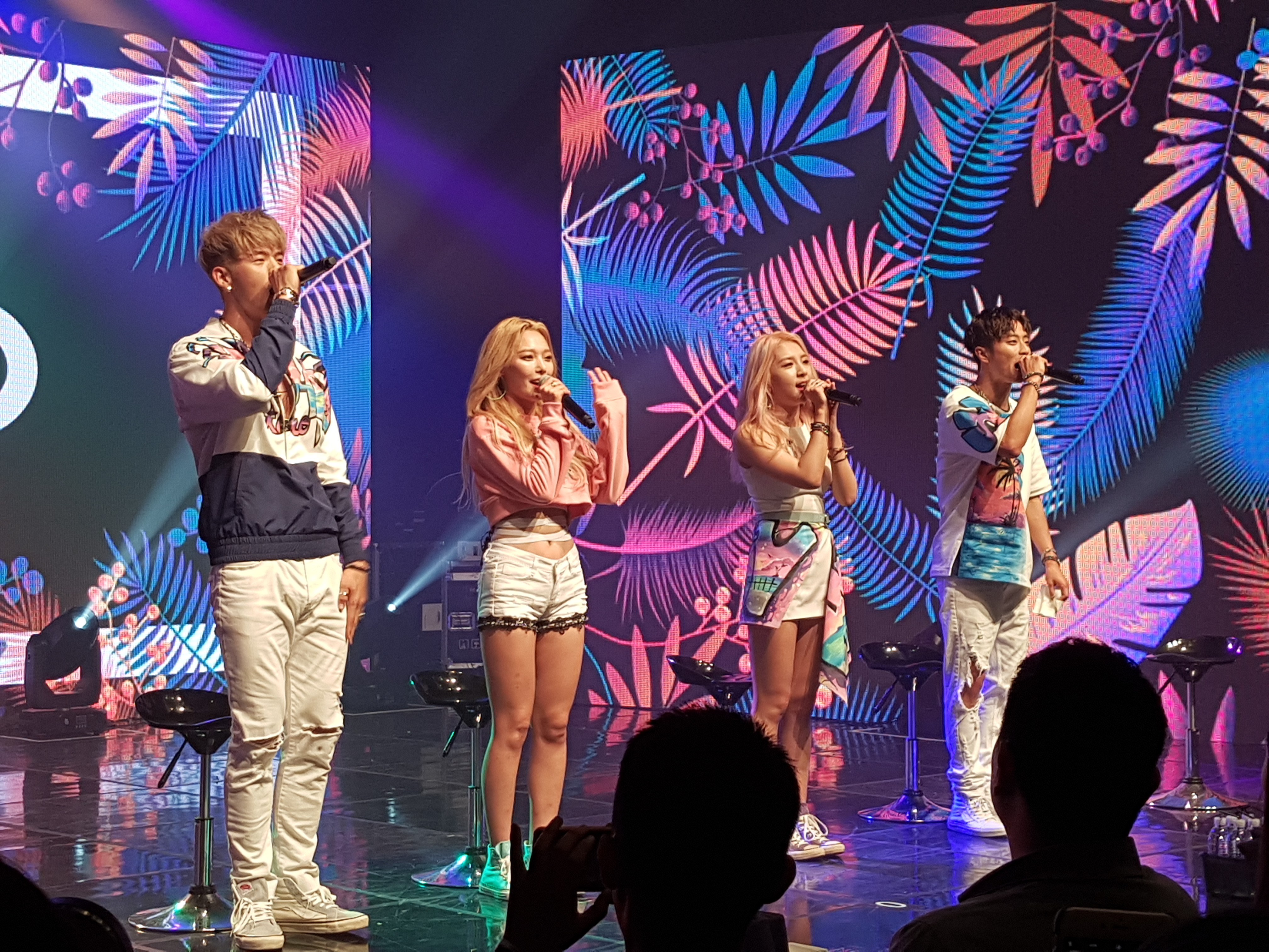 2017년 7월 19일 카드 첫번째 미니 앨범 HOLA HOLA 데뷔 쇼케이스